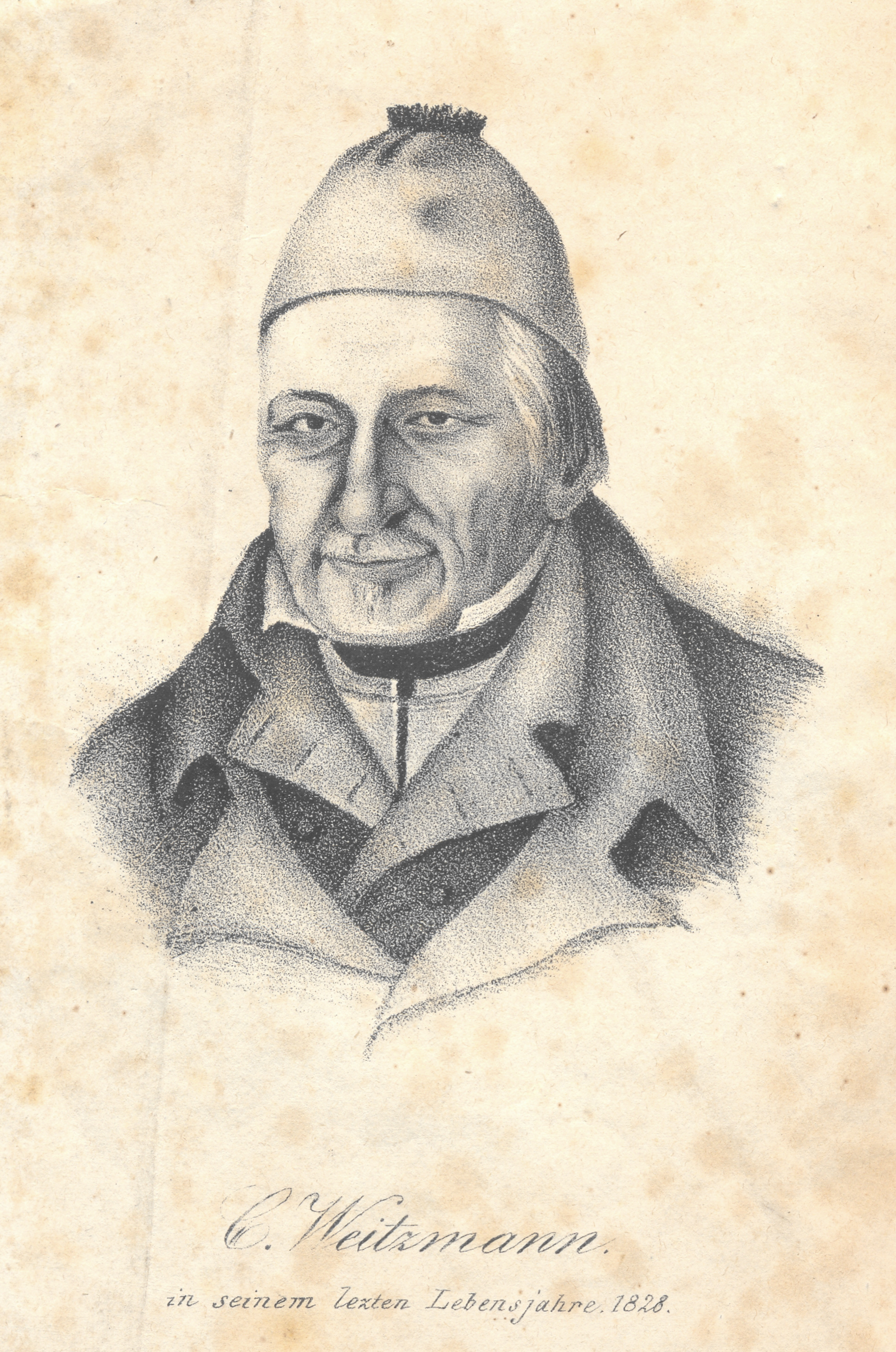 Carl Borromäus Weitzmann in seinem letzten Lebensjahre; aus: Auserlesene Gedichte, sowohl in reindeutscher als schwäbischer Mundart. Mit einer kurzen Biographie, seinem treuen Bildnisse und einer Wörter-Erklärung. Hrsg. von Friedrich Weitzmann. Stuttgart 1854